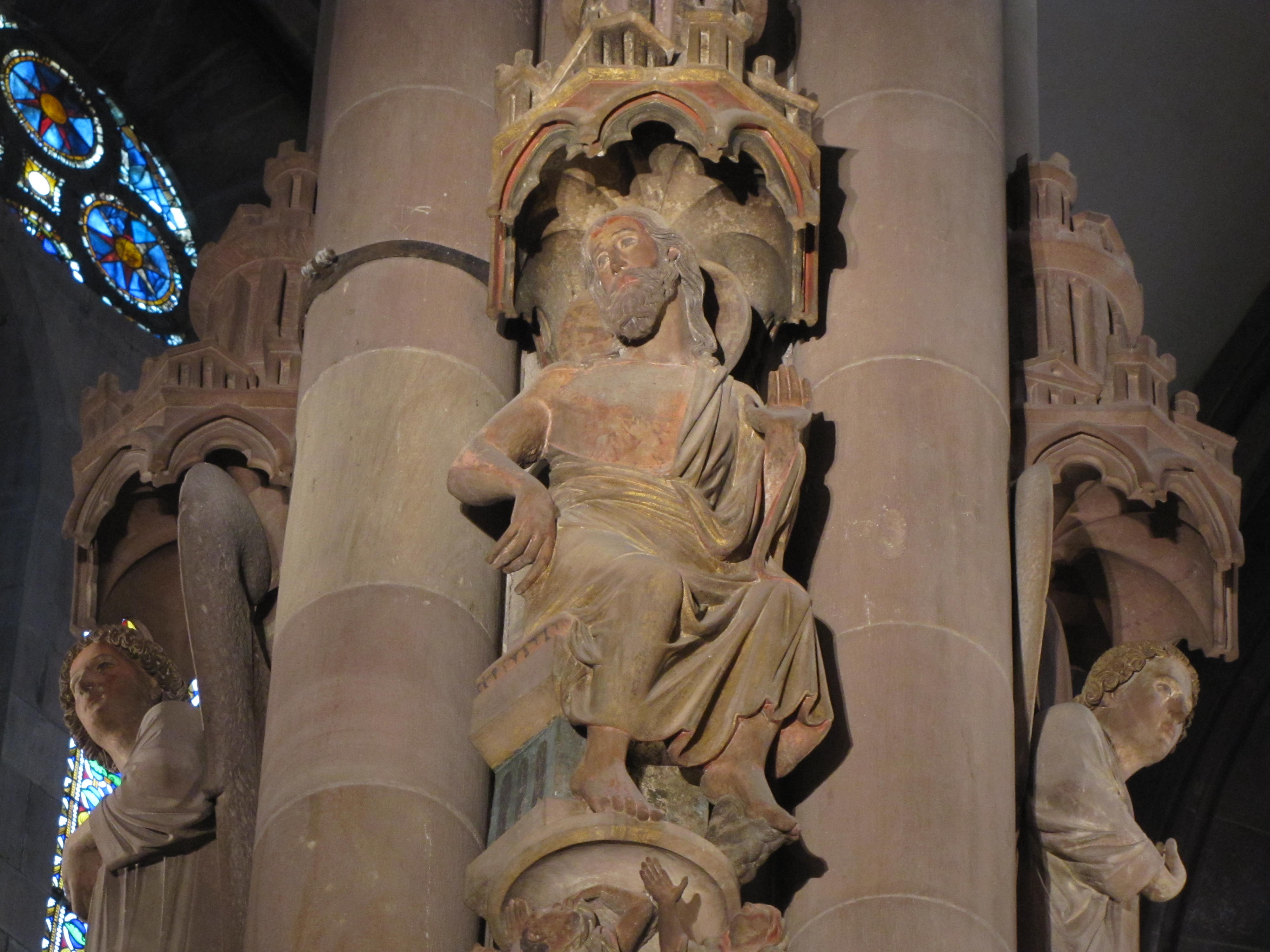 Alsace, Bas-Rhin, Cathédrale Notre-Dame de Strasbourg (PA00085015). Croisillon sud, Pilier des Anges (XIIIe): Le Christ juge lors du Jugement Dernier